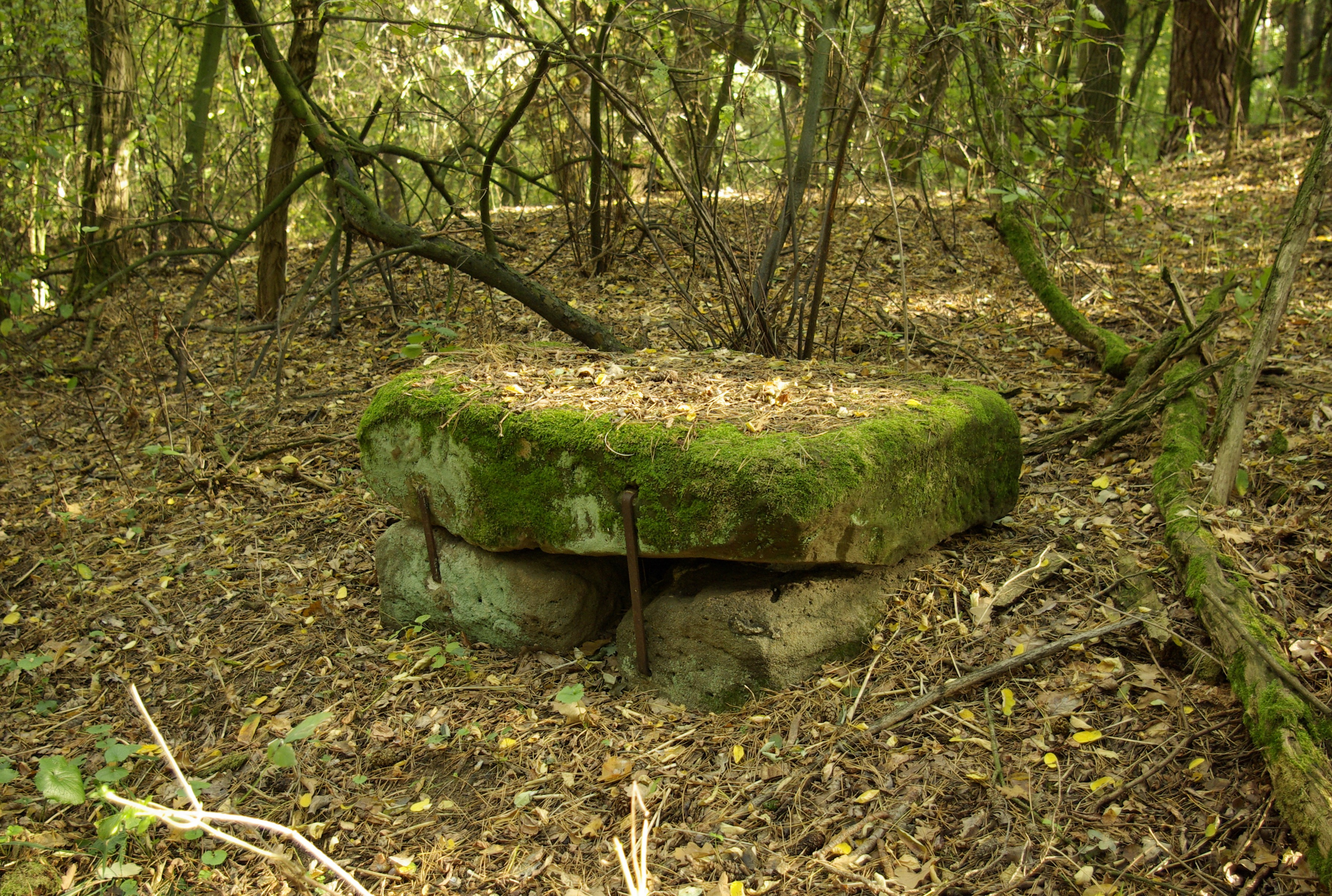 Der sogenannte Ruh- oder Große Stein am ehemaligen Weg zwischen Hüttendorf und Eltersdorf.